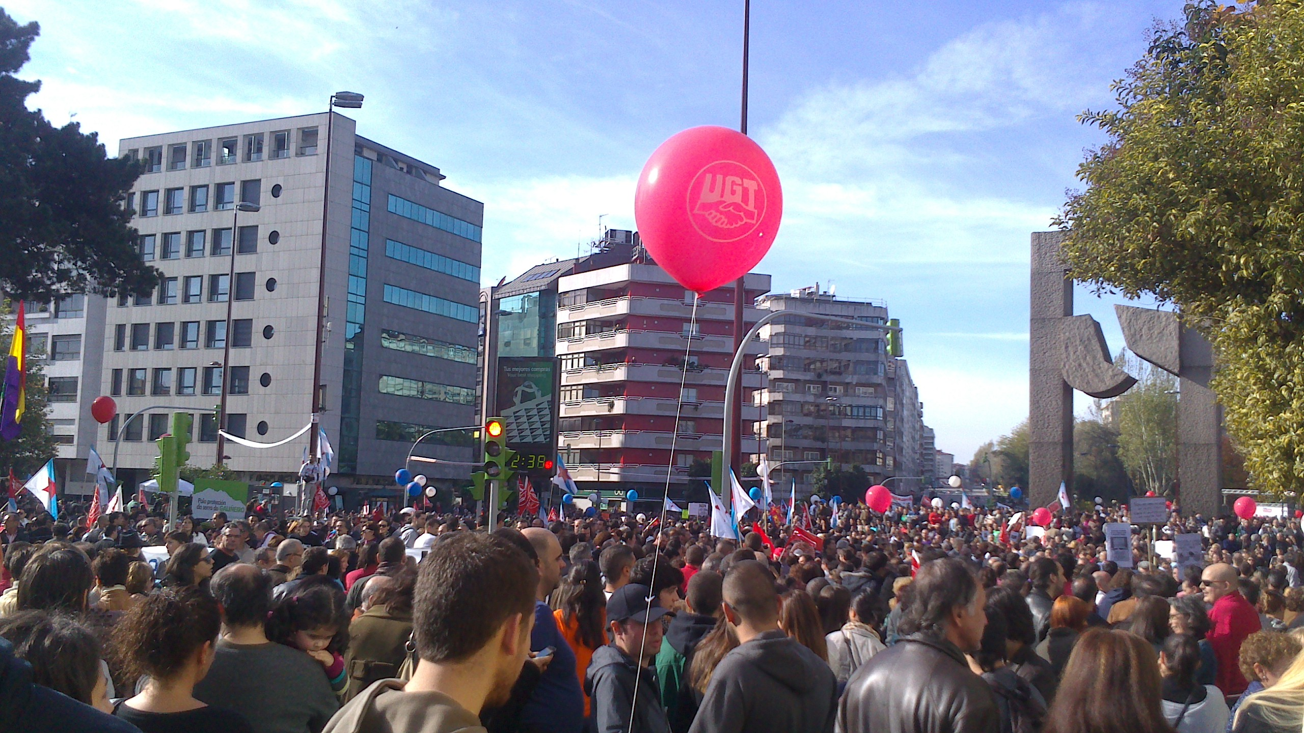 Huelga general del 14-N en Vigo, en el final del recorrido, la Plaza de España